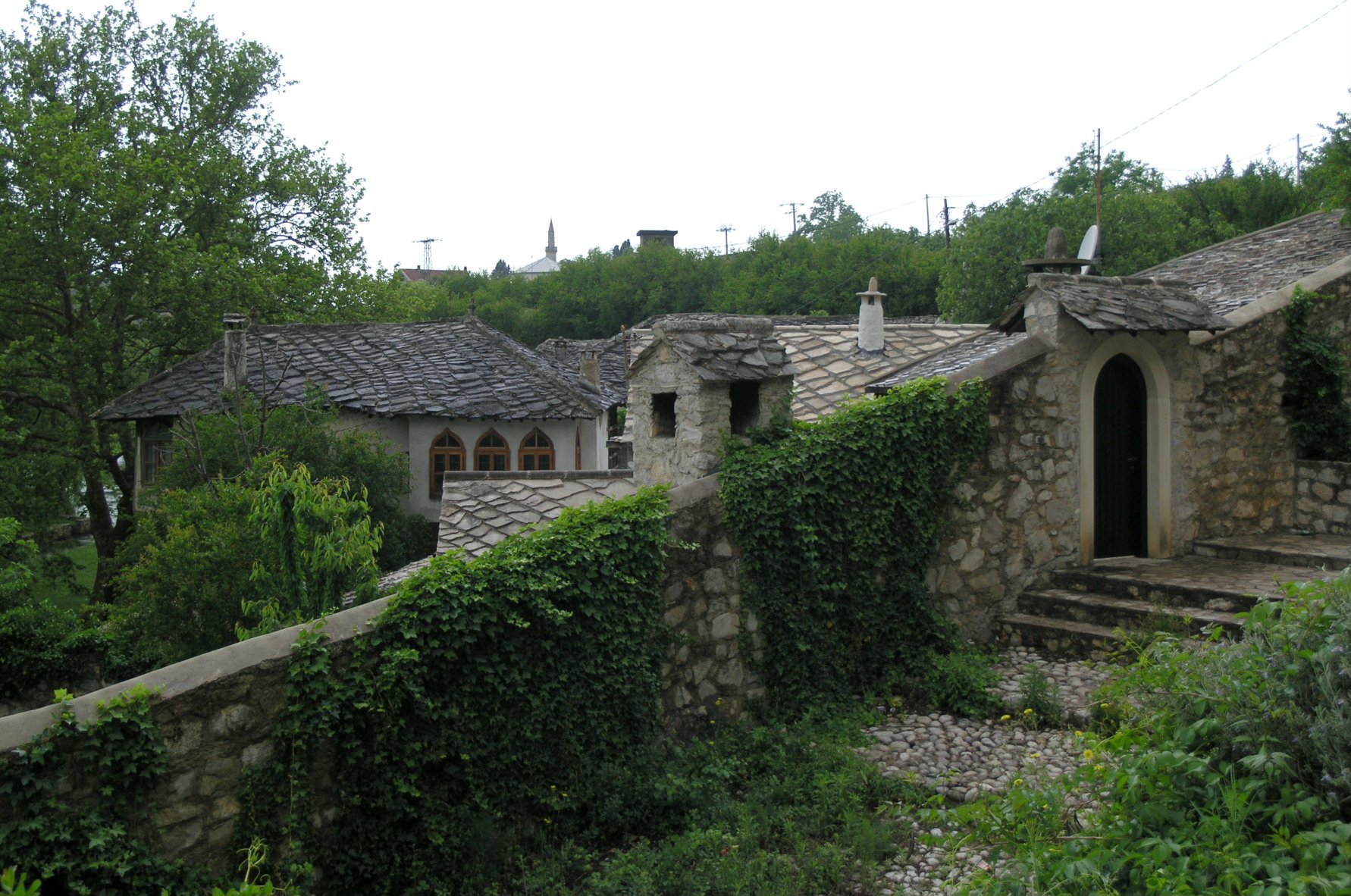 Stambeni kompleks porodice Velagić, Blagaj